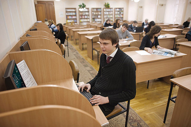 Сучасне фото читальний залу Наукової бібліотеки НПУ ім. Драгоманова